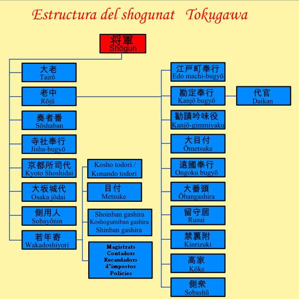 Organigrama